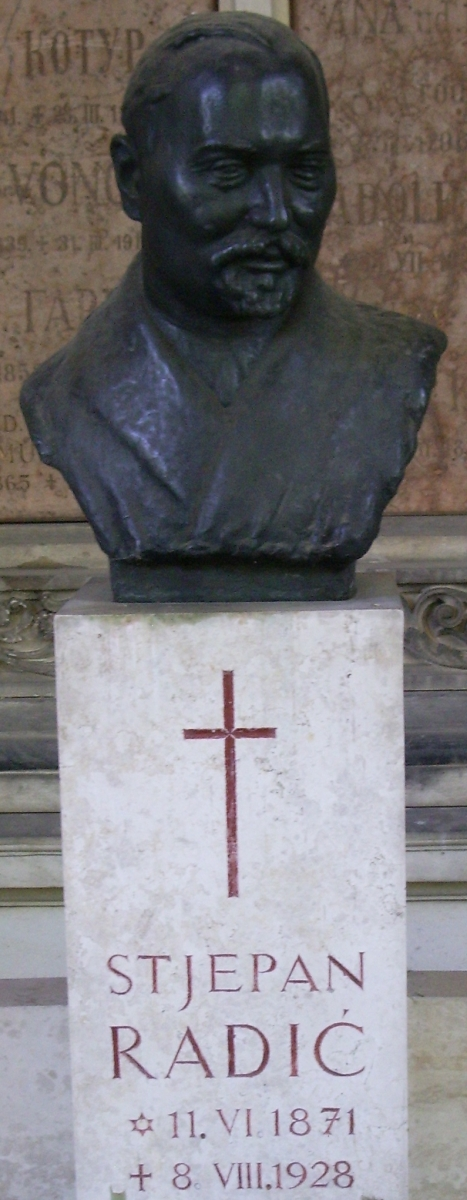 Spomenik Stjepanu Radiću na Mirogoju